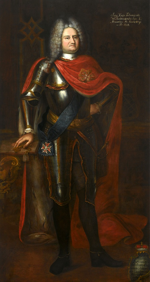 Portrait of Jerzy Aleksander Lubomirski (c.1669-1735)